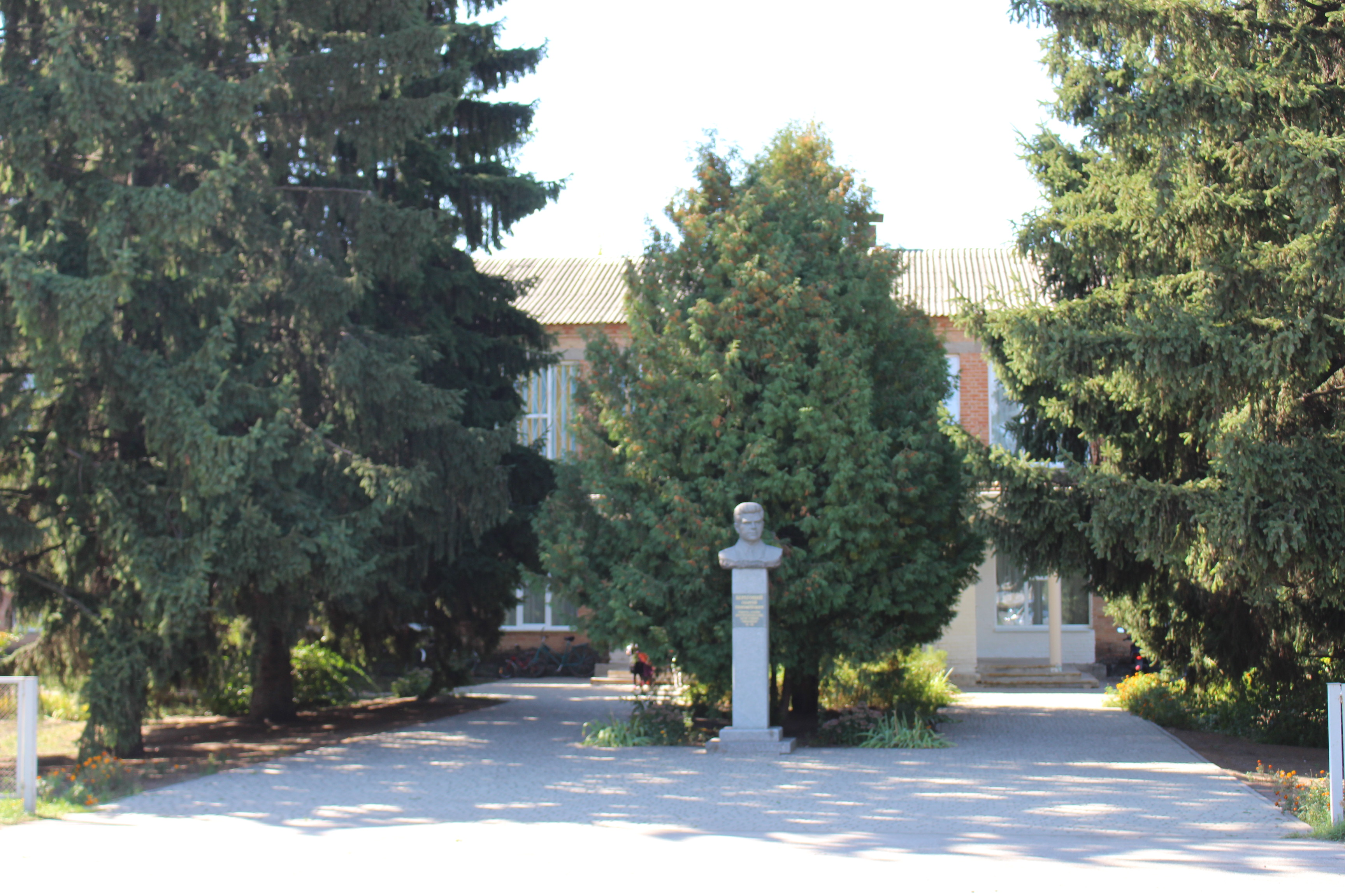 На цьому фото зображено погруддя Георгія Тимофійовича Берегового – льотчика-космонавта на фоні Федорівського НВК ім.Г.Т.Берегового. с.Федорівка, Карлівський район, Полтавська область